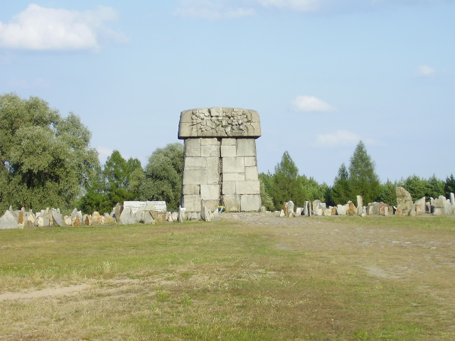 Pomnik w Treblince